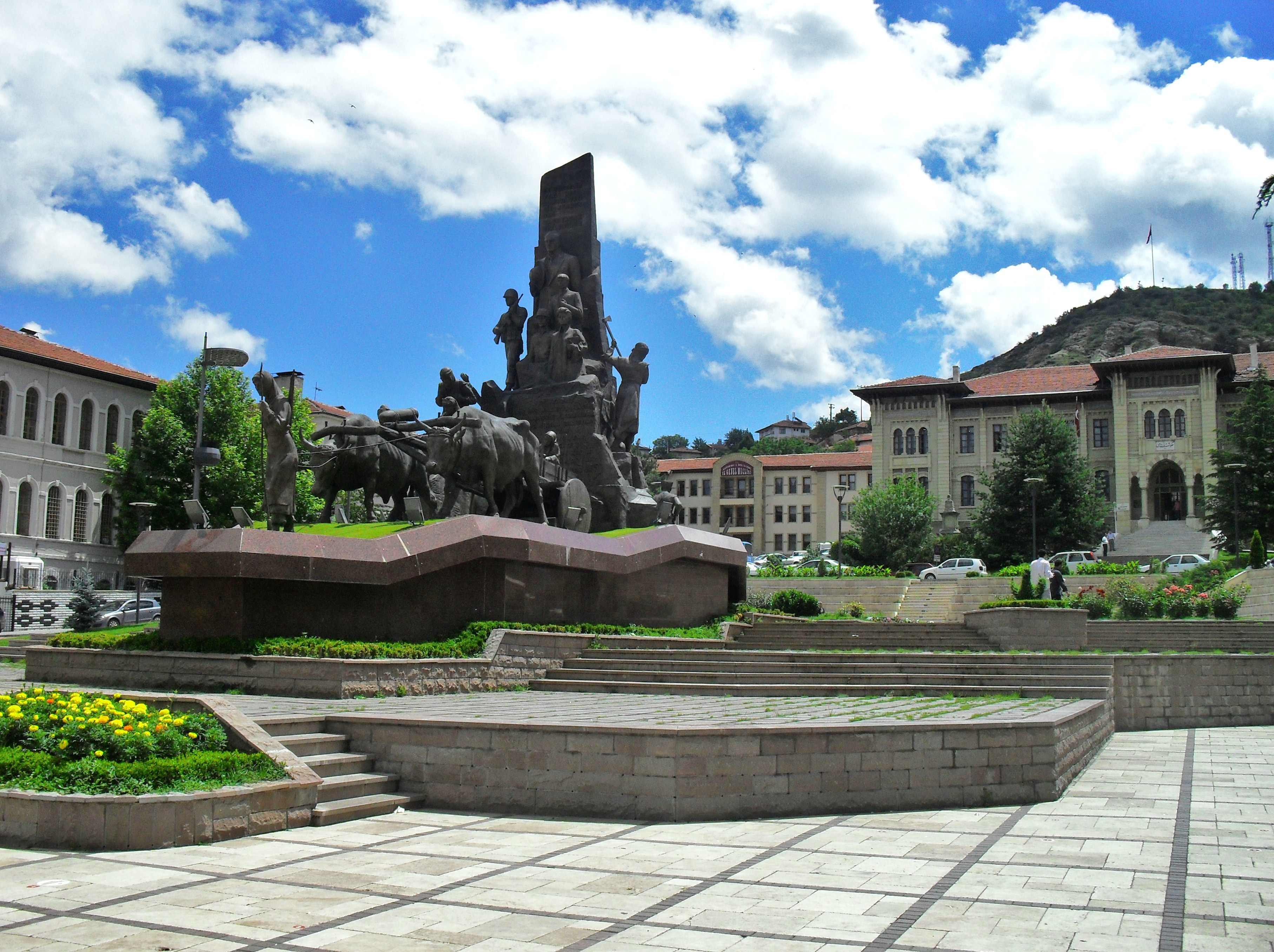 Kastamonu Cumhuriyet Meydanı Anıt